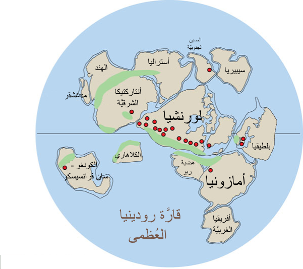 خارطة تصوُّريَّة لما كانت عليه قارَّة رودينيا العُظمى مُنذ 1.1 مليار سنة.